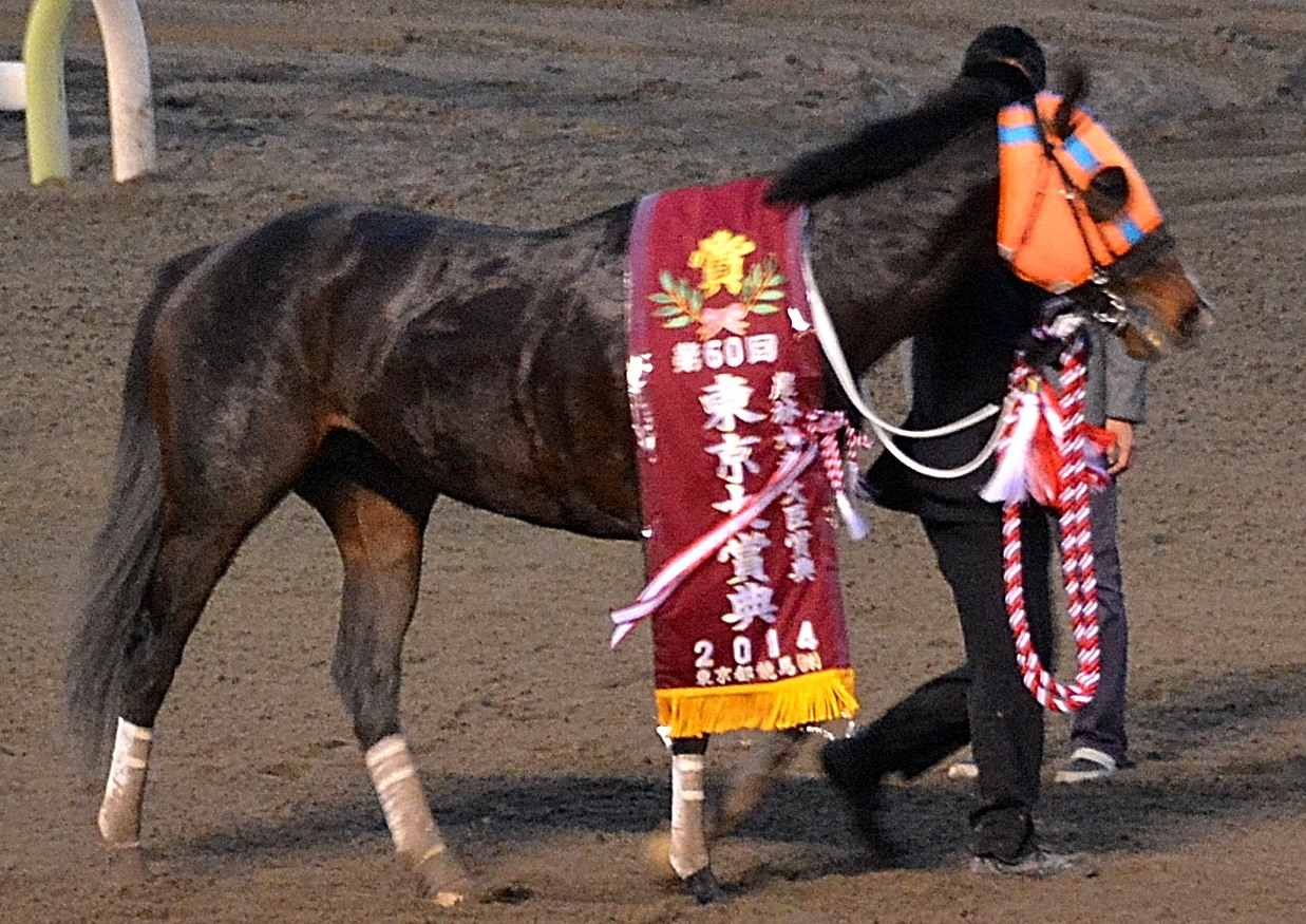 2014年12月29日に大井競馬場の第10競走で行われた「第60回東京大賞典」で、勝利したホッコータルマエに対して着けられた優勝レイを、観客席から撮影したもの。（参考： ）